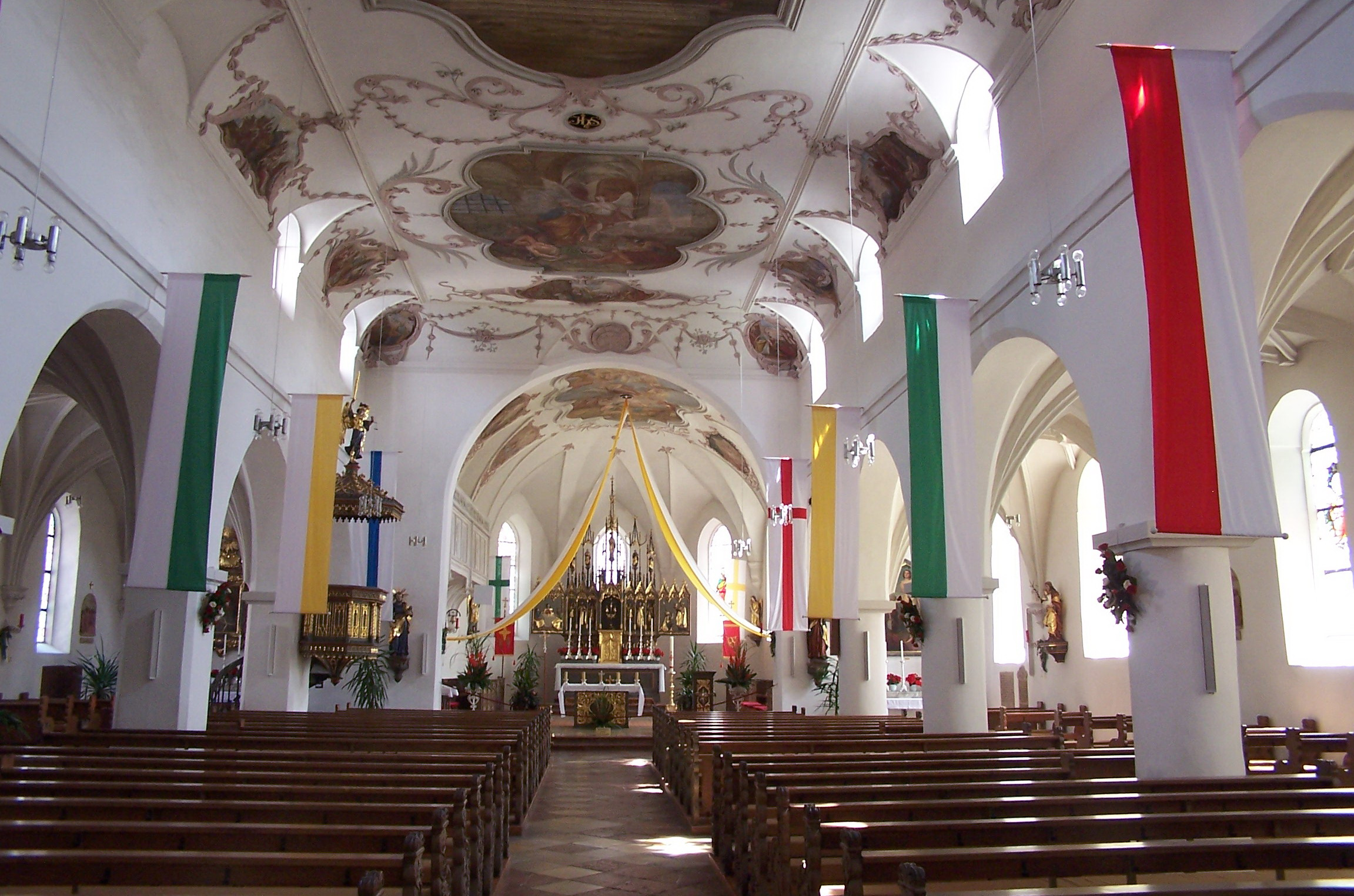 Wörth an der Donau. Pfarrkirche St. Petrus. Dreischiffige basikale Anlage mit flach gedecktem Mittelschiff, gewölbten Seitenschiffen und einschiffig gewölbtem Chor.